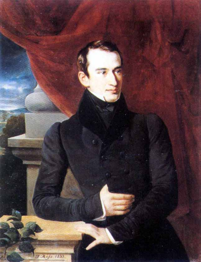 Волконский Григорий Петрович (1808 - 1882) светлейший князь, сын министра Двора П. М. Волконского и С. Г. Волконской.Был женат на графине Марии Александровне Бенкендорф (1820-1880). Петербургский знакомый А. С. Пушкина.